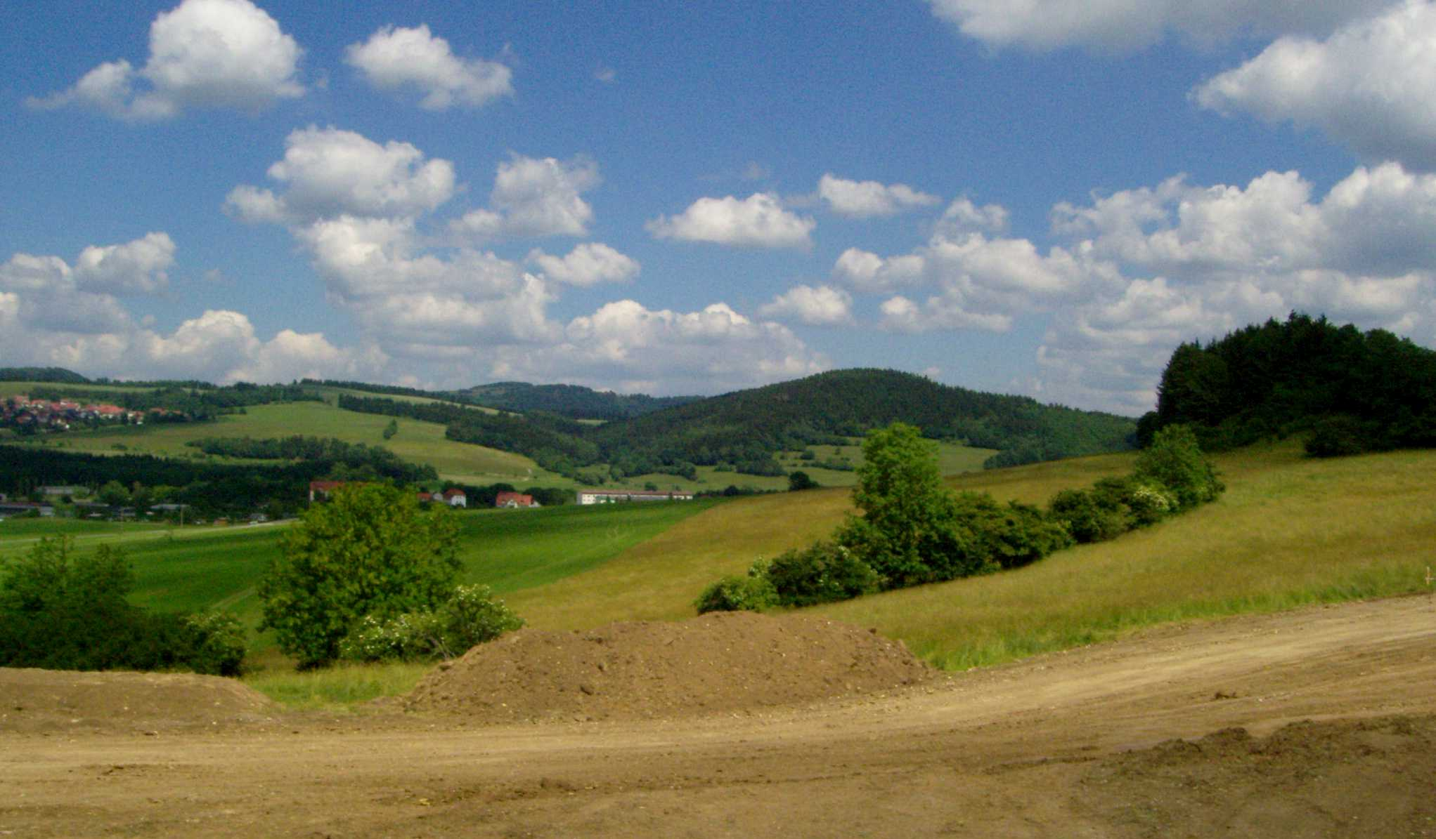 Blick von der Trasse der A 73 auf den Wachberg (621m, links) mit Merbelsrod, den Priemäusel (625m, Mitte) und den Ahornsberg (532m, rechts). In der Schneise zwischen den beiden erstgenannten Bergen erkannt man den Simmersberg (781m), teils von seinem Nebengipfel Kohlberg (718m) verdeckt. Im Vordergrund der nördliche Teil von Brattendorf.